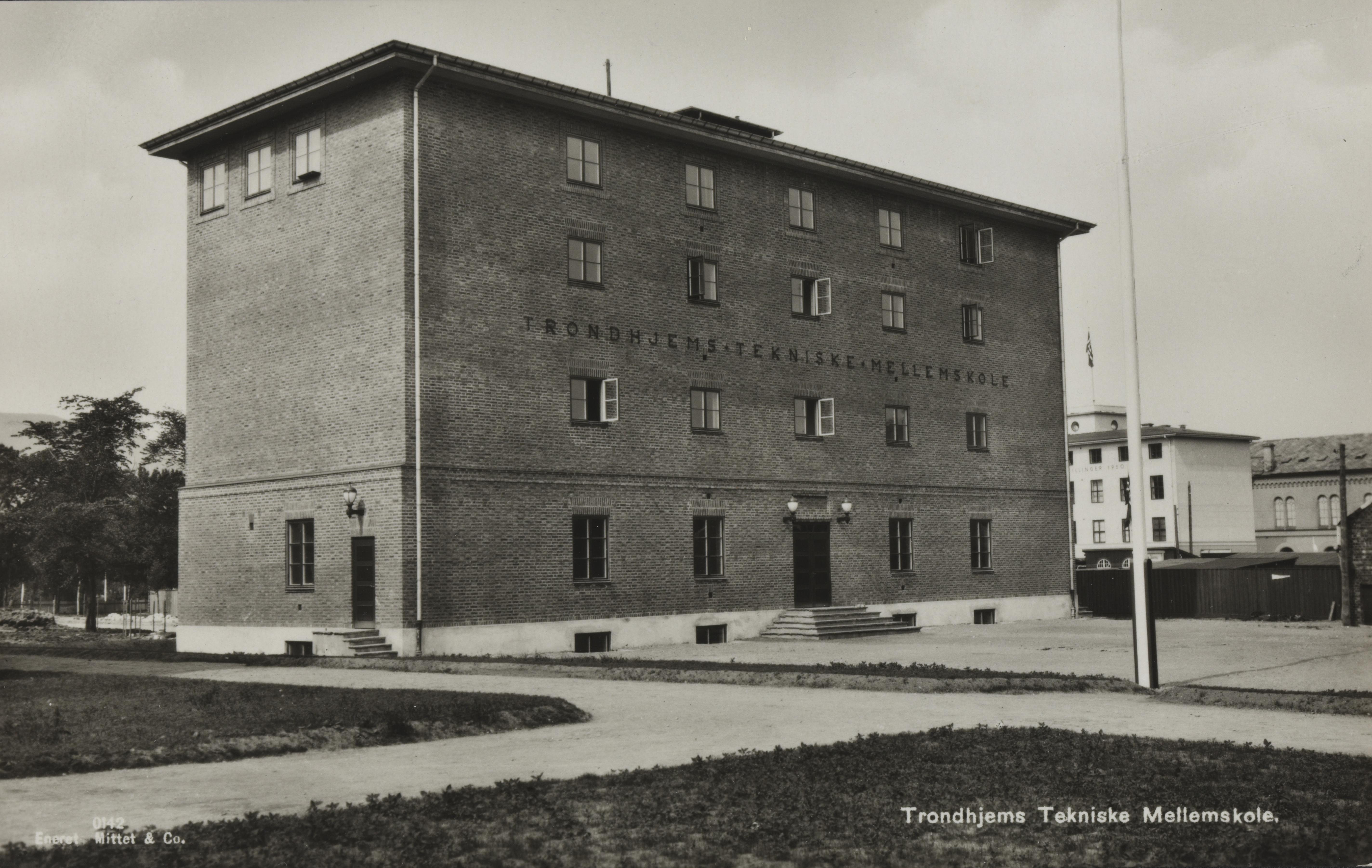 Bildet er hentet fra Nasjonalbibliotekets bildesamling Kalvskinnet, Trondheim, Sør Trøndelag